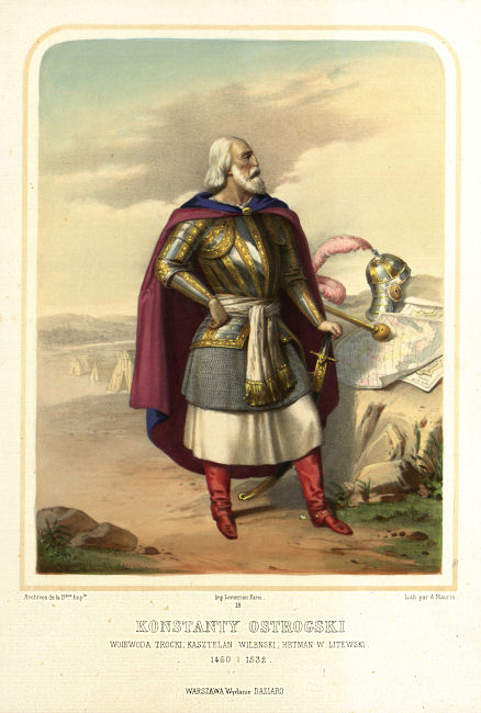 Беларуская (тарашкевіца): Партрэт Канстантына Астроскага (Kanstantyn Astroski)